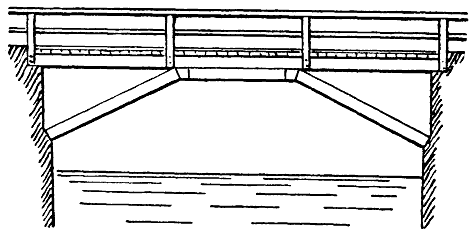 Träbro. Spännverk